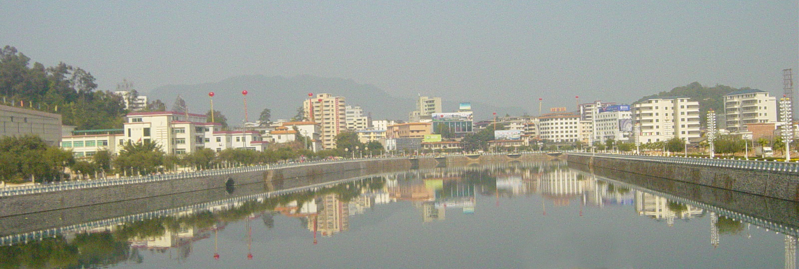 仁化县城一景 图片拍摄人：竹围墙 拍摄时间：2006年1月30日